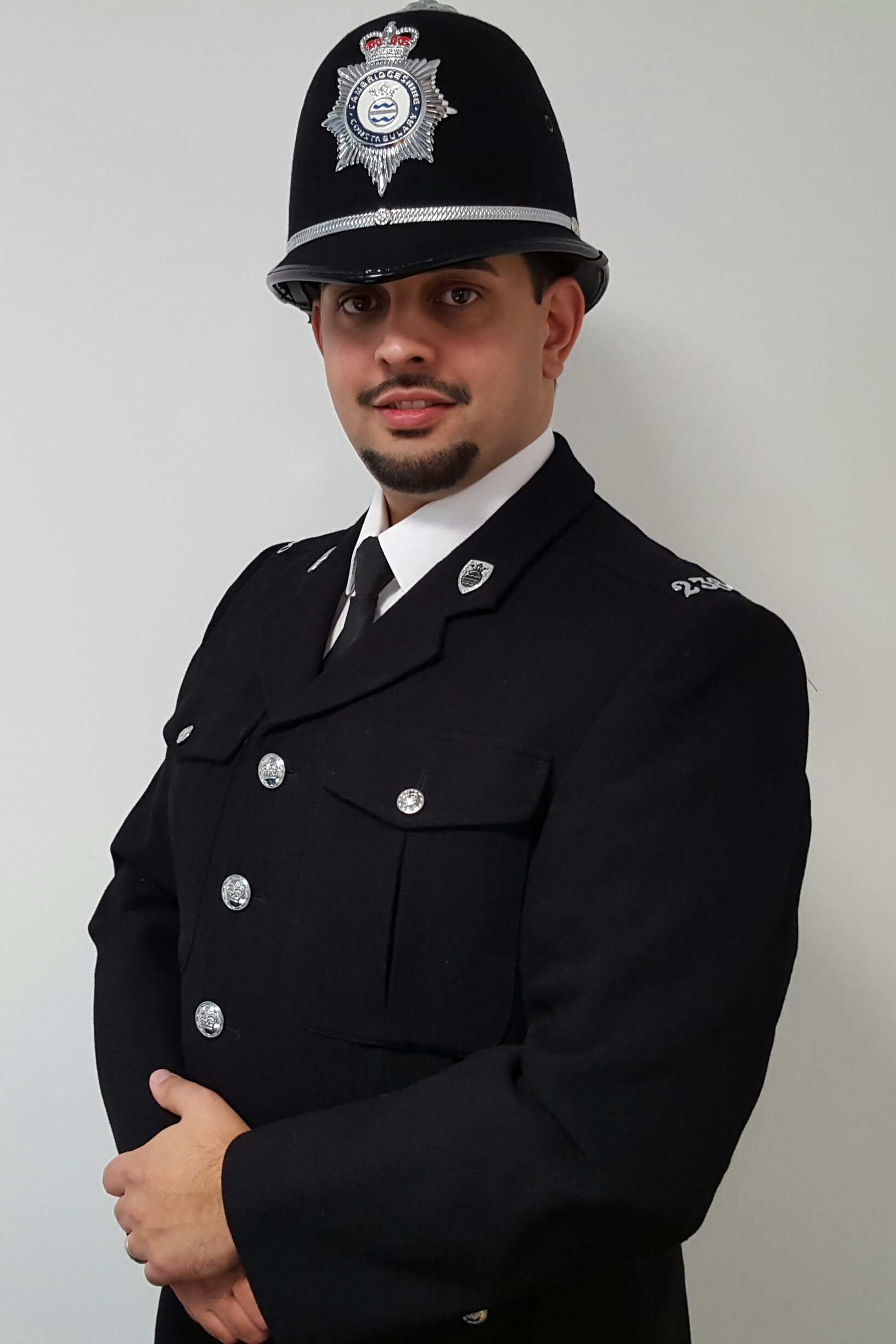 Petr Torak v uniforme Britskeho policisty